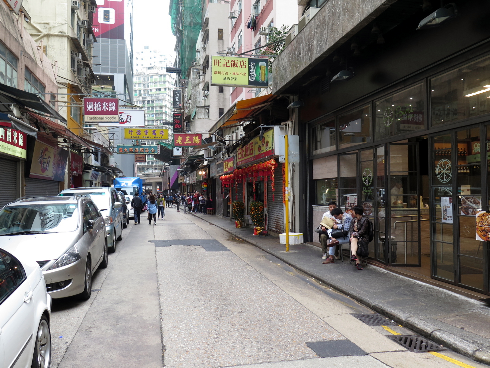 Tang Lung Street, Causeway Bay